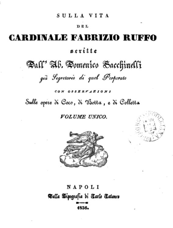 Memorie storiche sulla vita del cardinale Ruffo